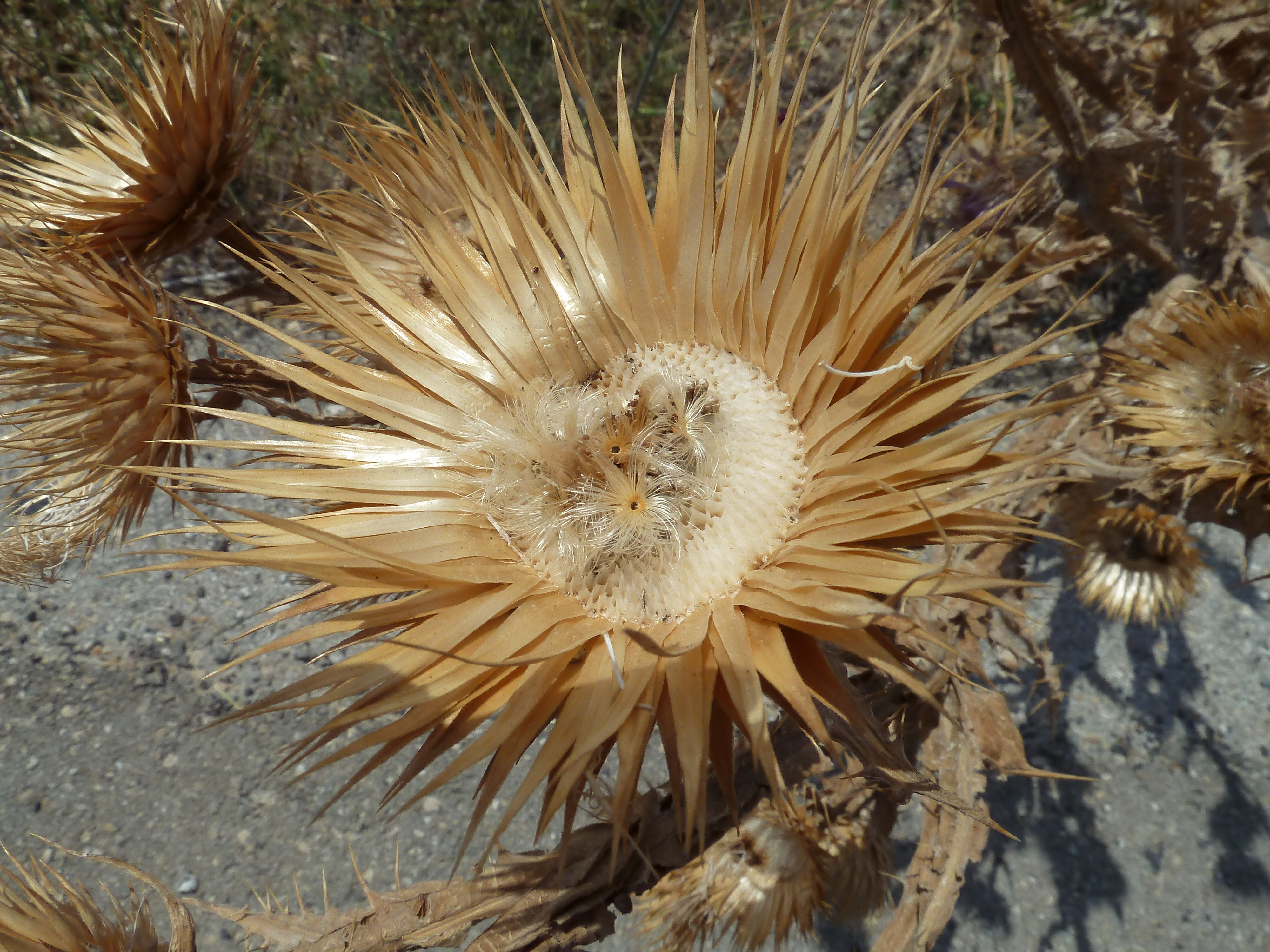 Onopordum nervosum (Cardo gigante) - Capítulo post-fructificación con cipselas in situ y receptáculo alveolado . - Carretera nacional N301, km209,250, Paraje el Carril de la Longaniza, circa La Roda (Albacete, España).